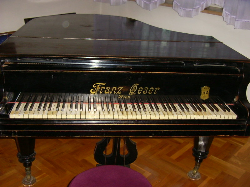 Franz Oeser gyártmányú, bécsi mechanikás rövidzongora a 19. század végéről